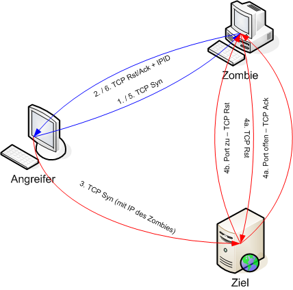 Verlauf eines TCP Idlescans